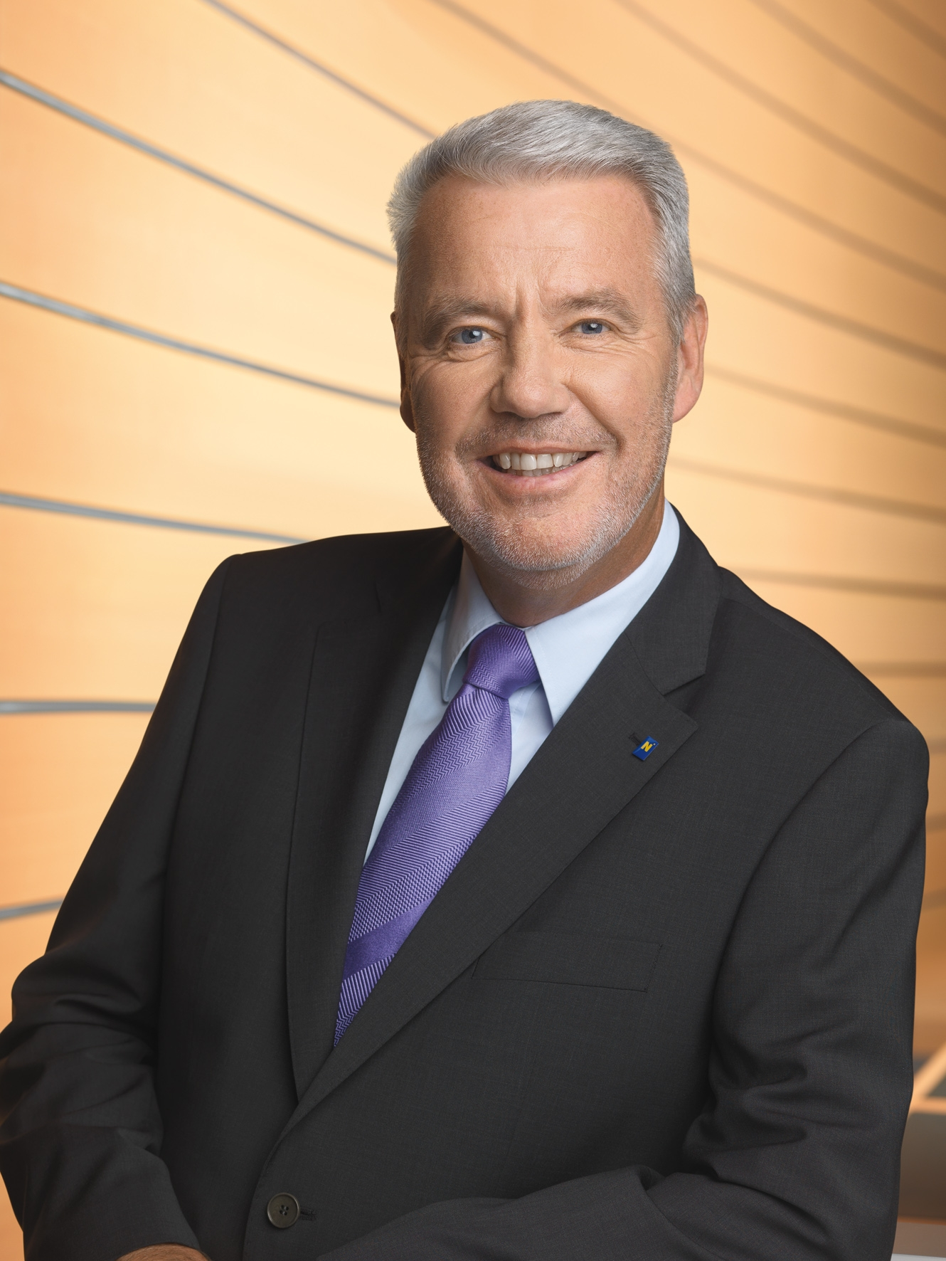 Landtagsabgeordneter und Klubobmann Klaus Schneeberger des NÖ Landtages